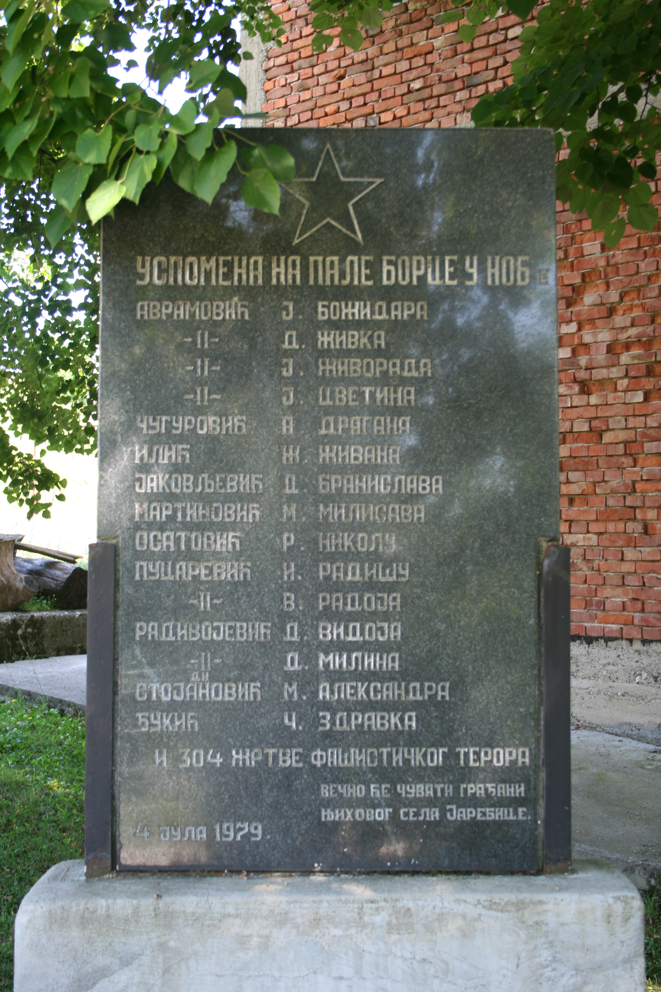 Spomenik NOB-a u školskom dvorištu, Jarebice